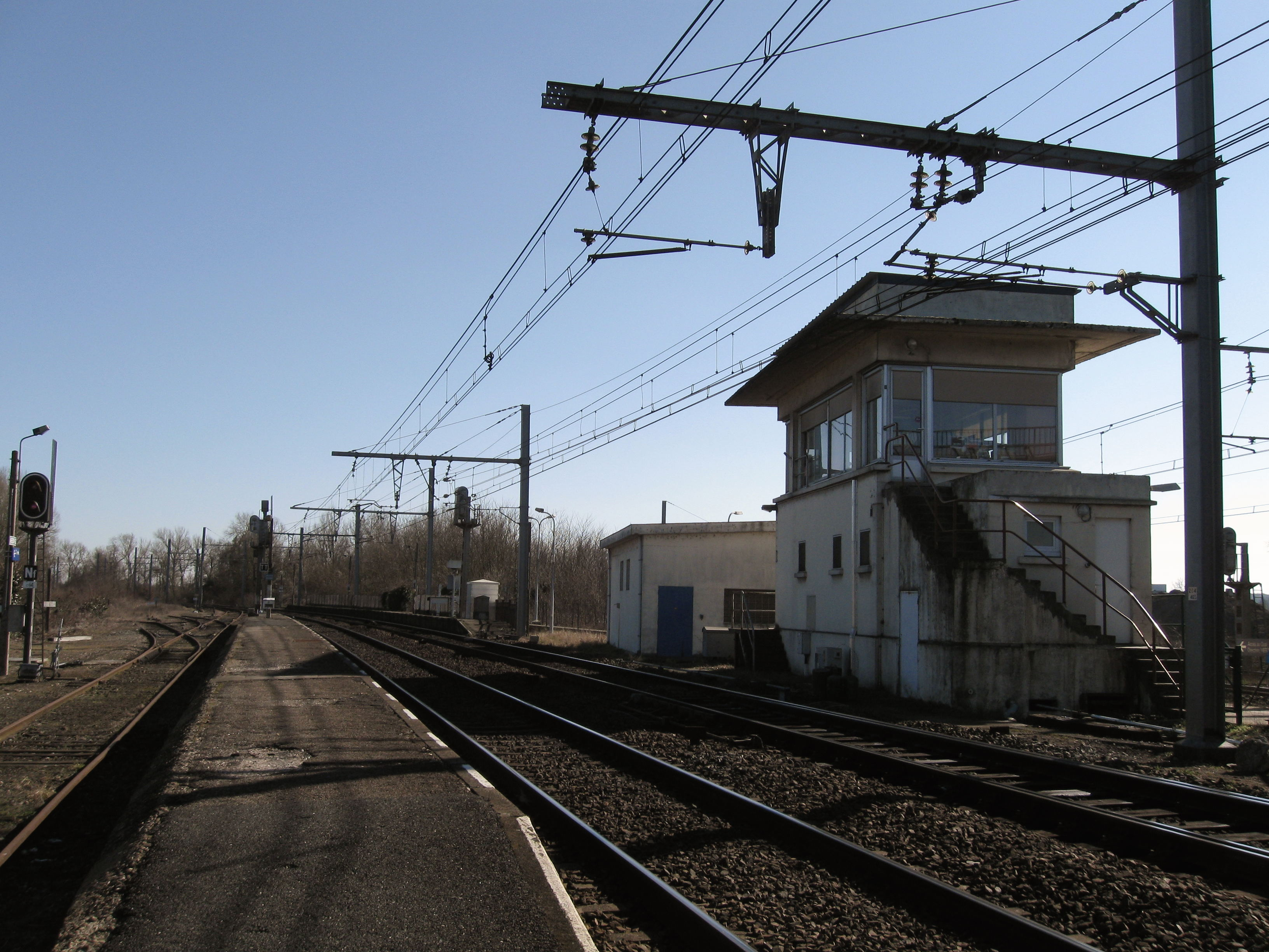 Gare de Vierzon-Forges, Vierzon, Cher, France